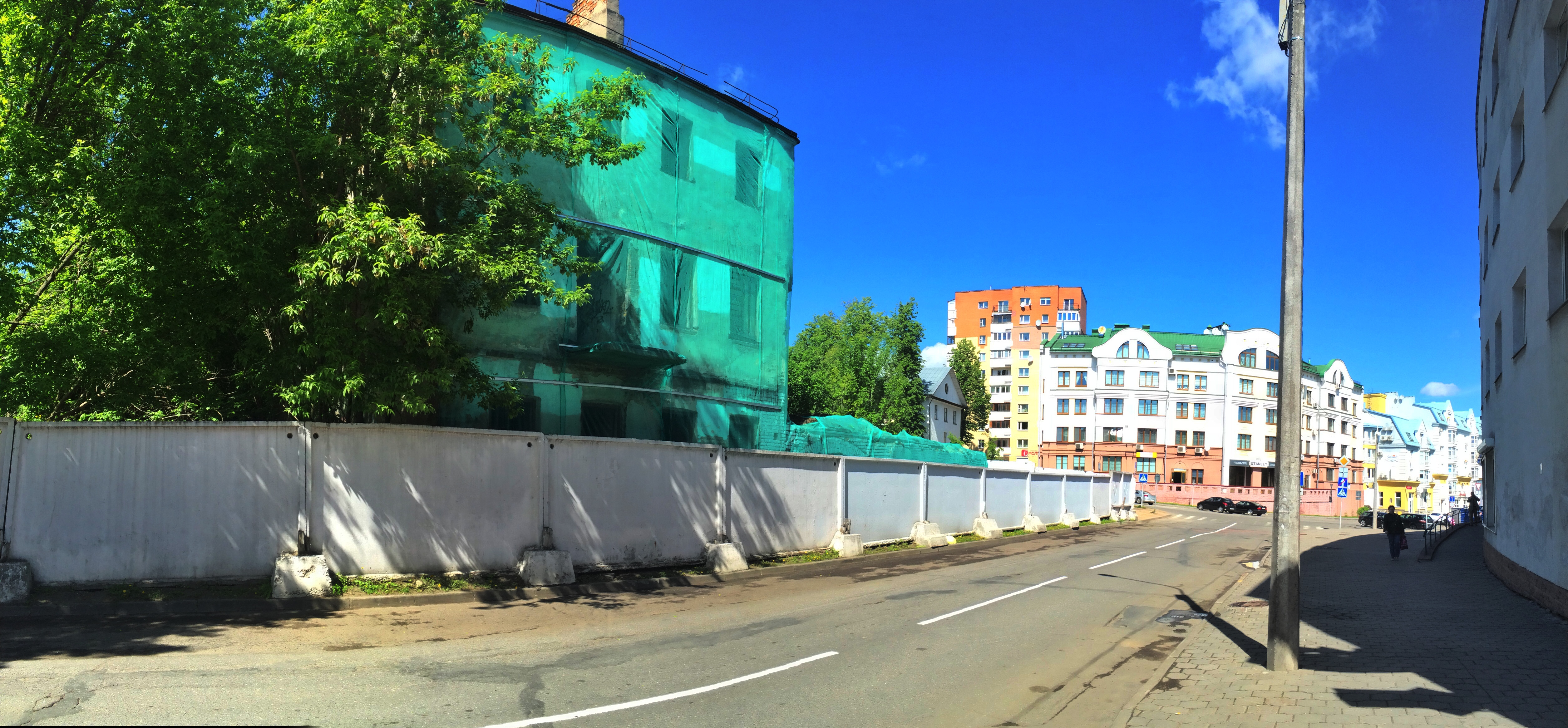 Фото улицы Освобождения ближе к Замковой/Обойной